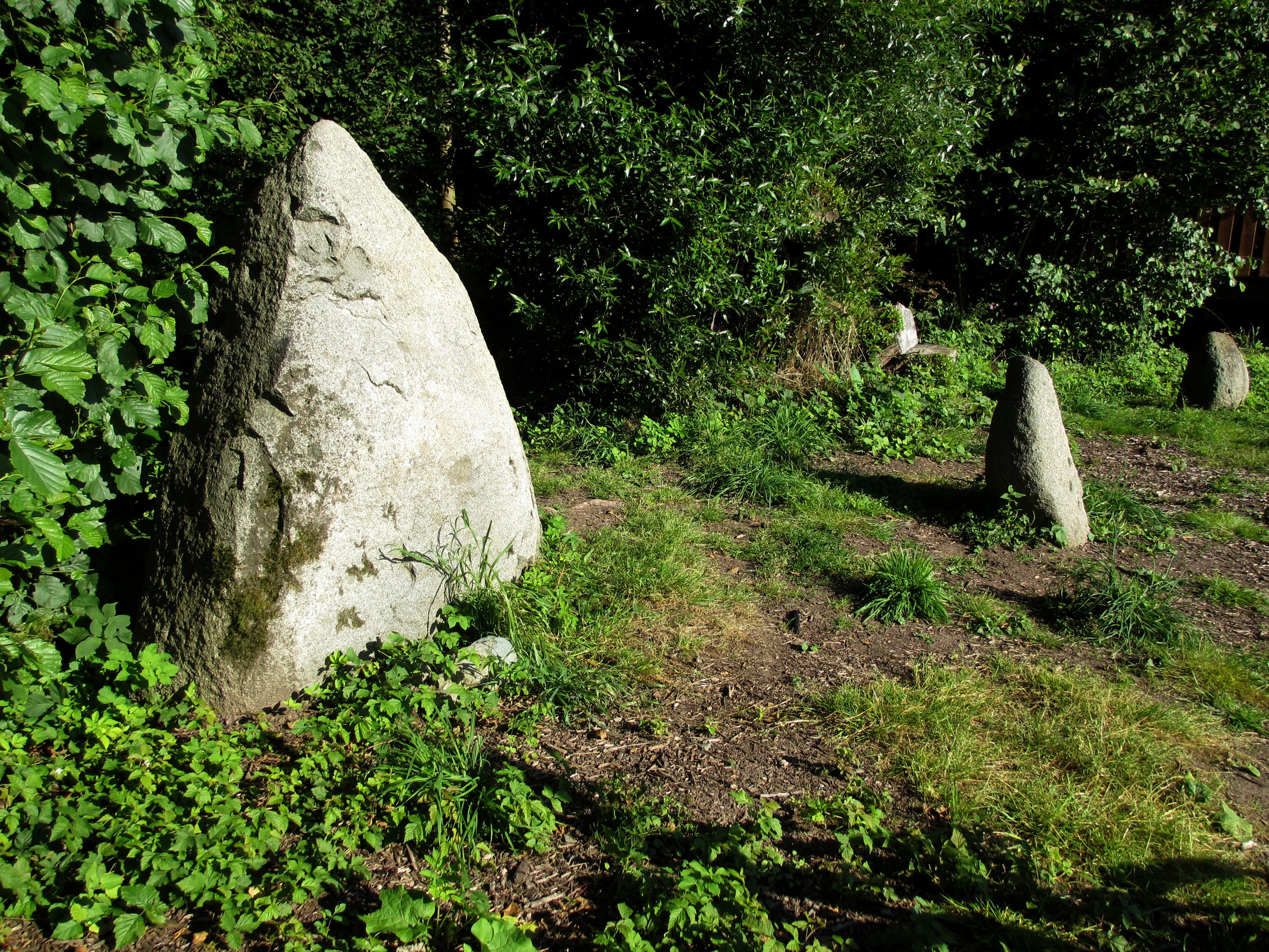 (NSG:HE-1411008)_Scheftheimer Wiesen bei Darmstadt Menhiranlage am Ruthsenbach in der Nähe von Rossdorf